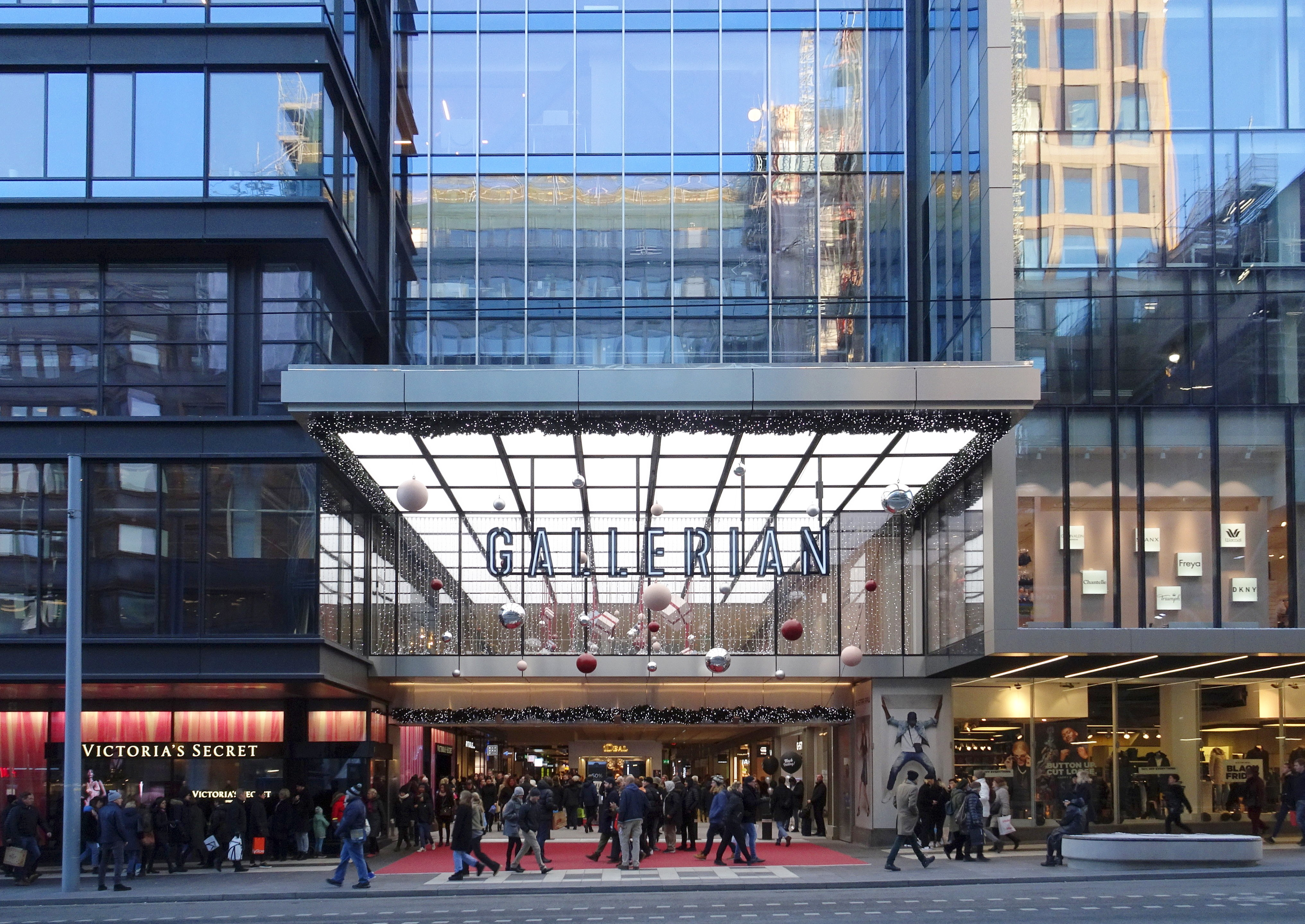 Gallerians entré från Hamngatan